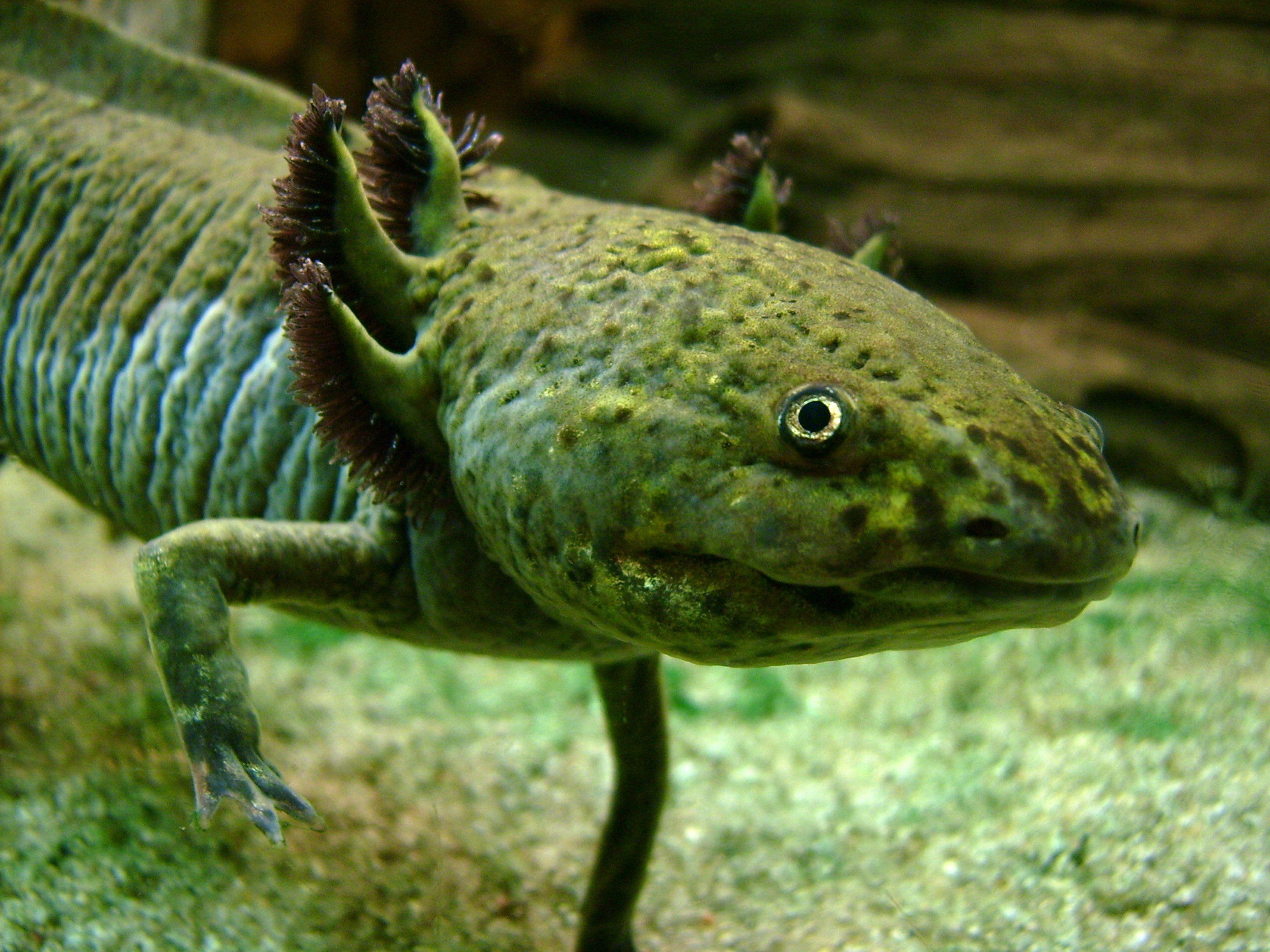 Axolotl